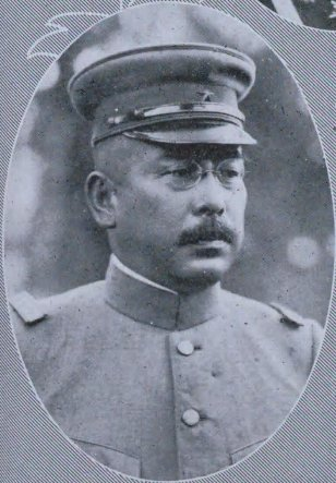 福田雅太郎